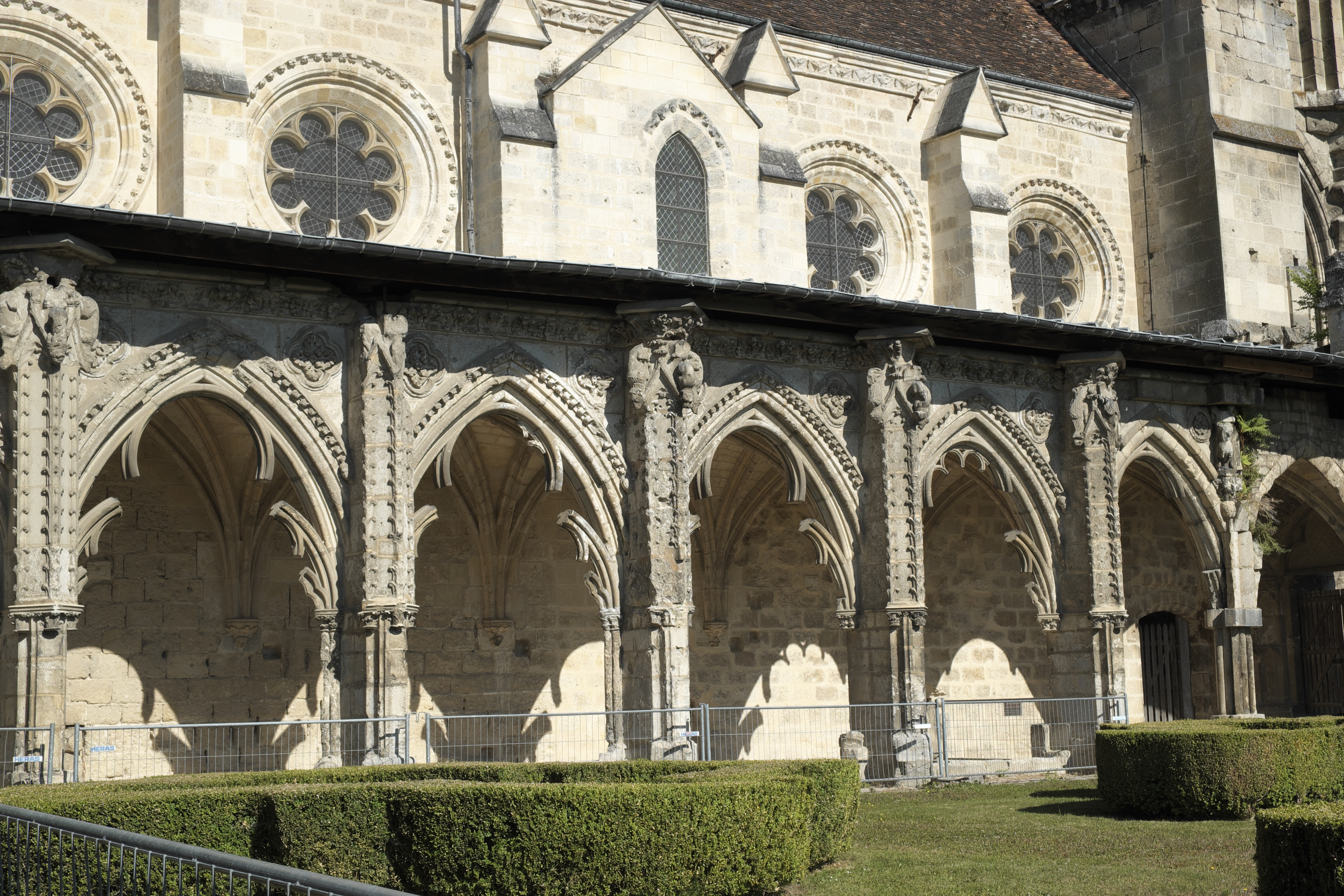 Großer Kreuzgang der ehemaligen Abtei Saint-Jean-des-Vignes in Soissons im Département Aisne (Picardie/Frankreich)